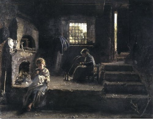 The young sewer by Fillippo Palizzi